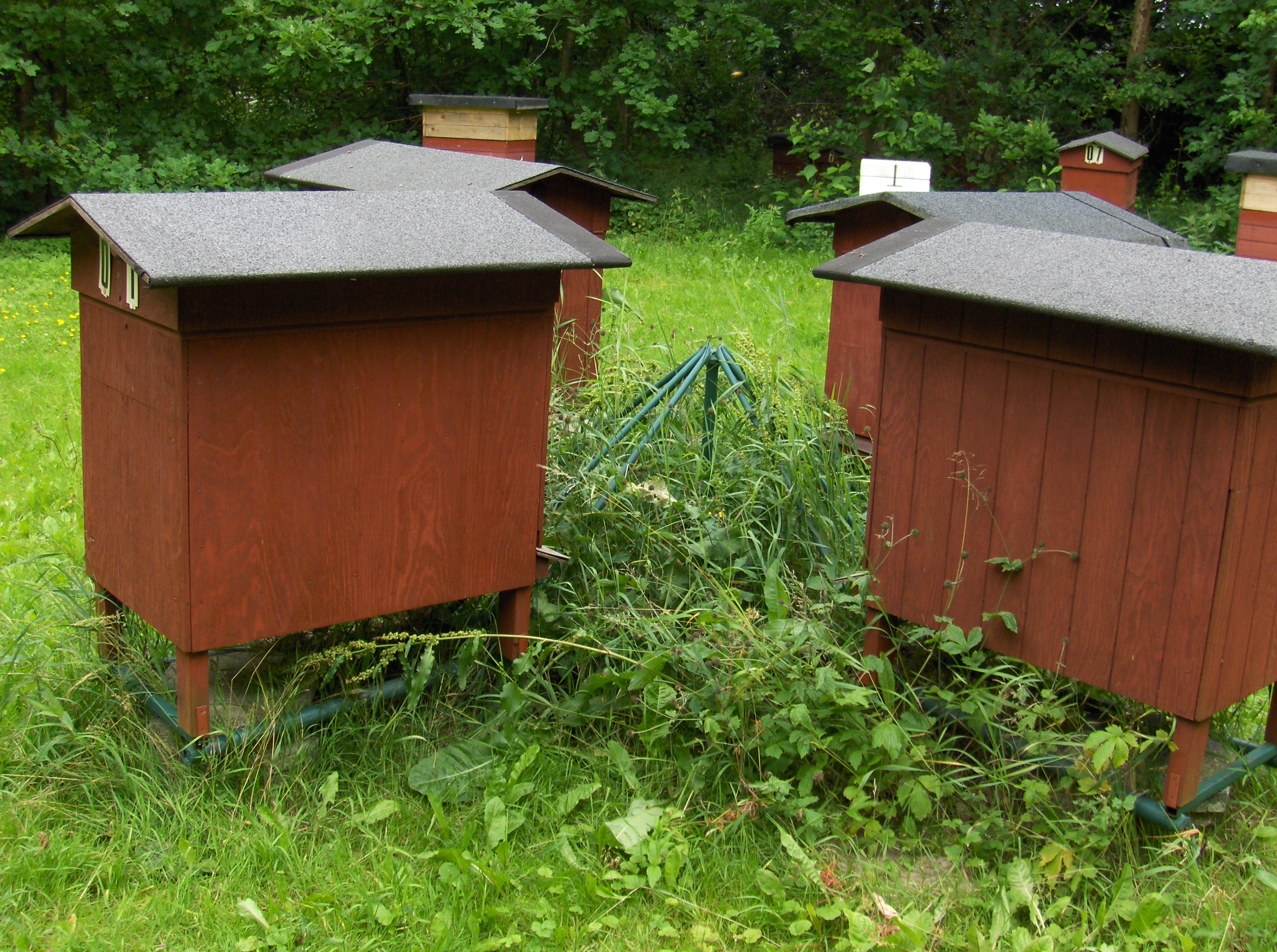 Bistader i karrusel. Billede 13.